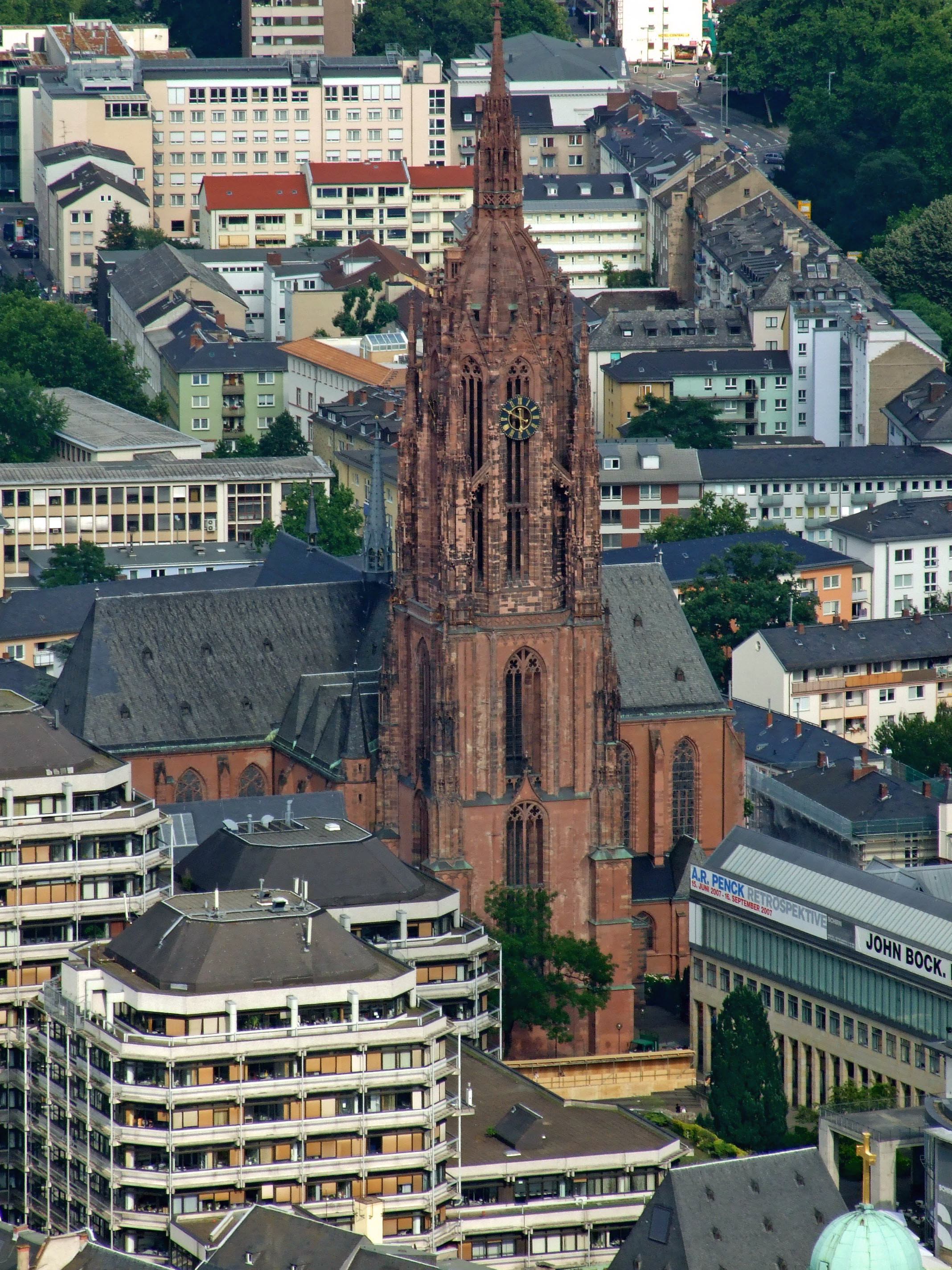 Dom in Ffm